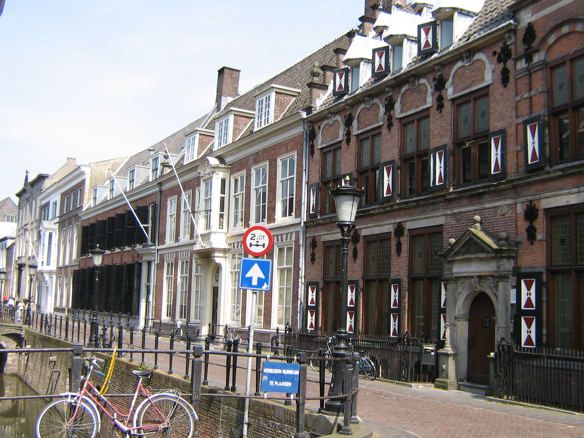 Drift, Utrecht, NL